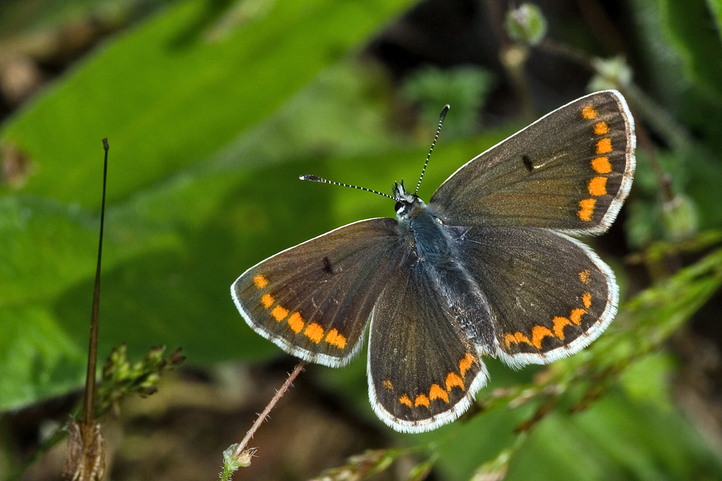 Aricia agestis